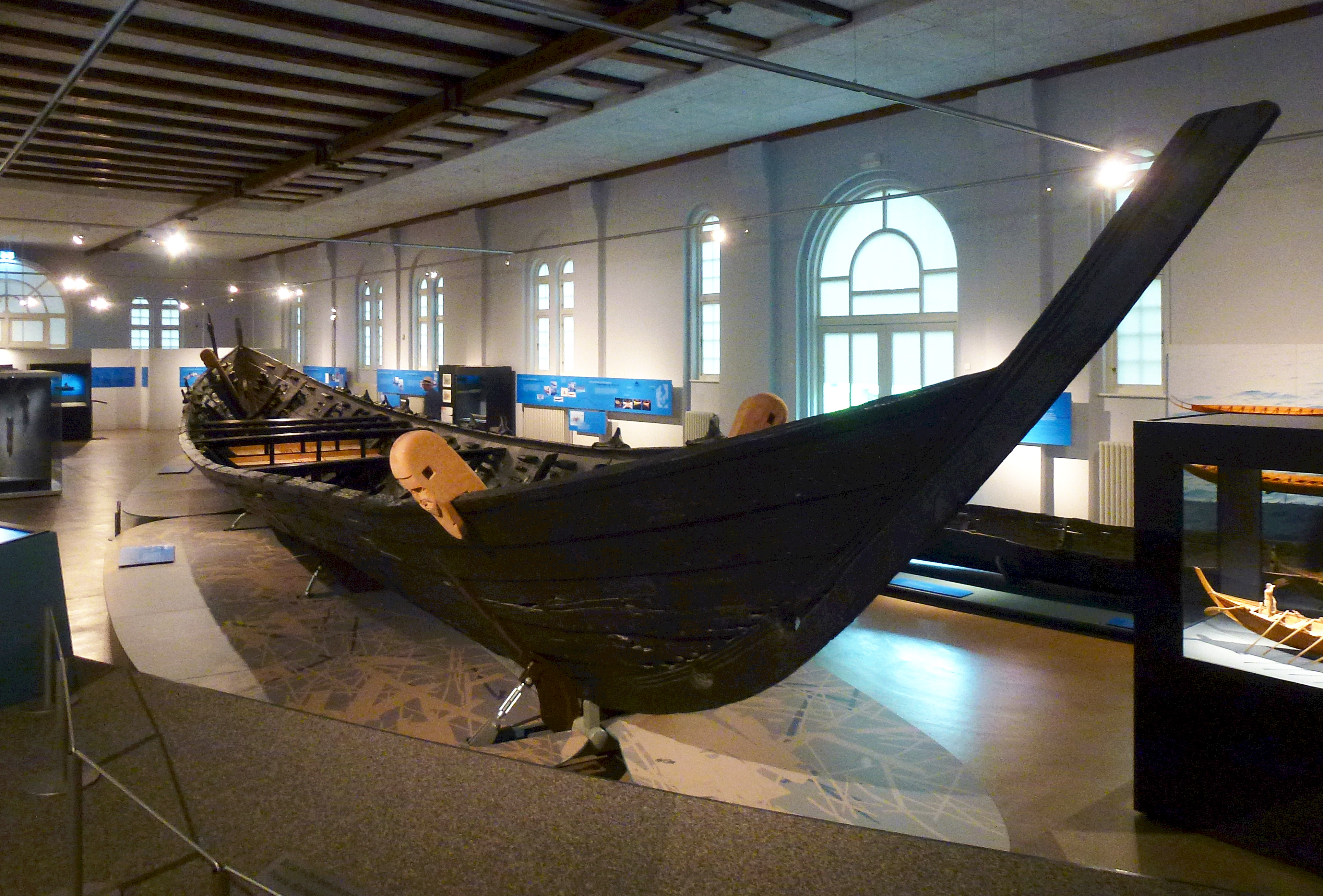 Das Nydam-Boot in der Nydam-Halle des Archäologischen Landesmuseums in Schloss Gottorf, Schleswig